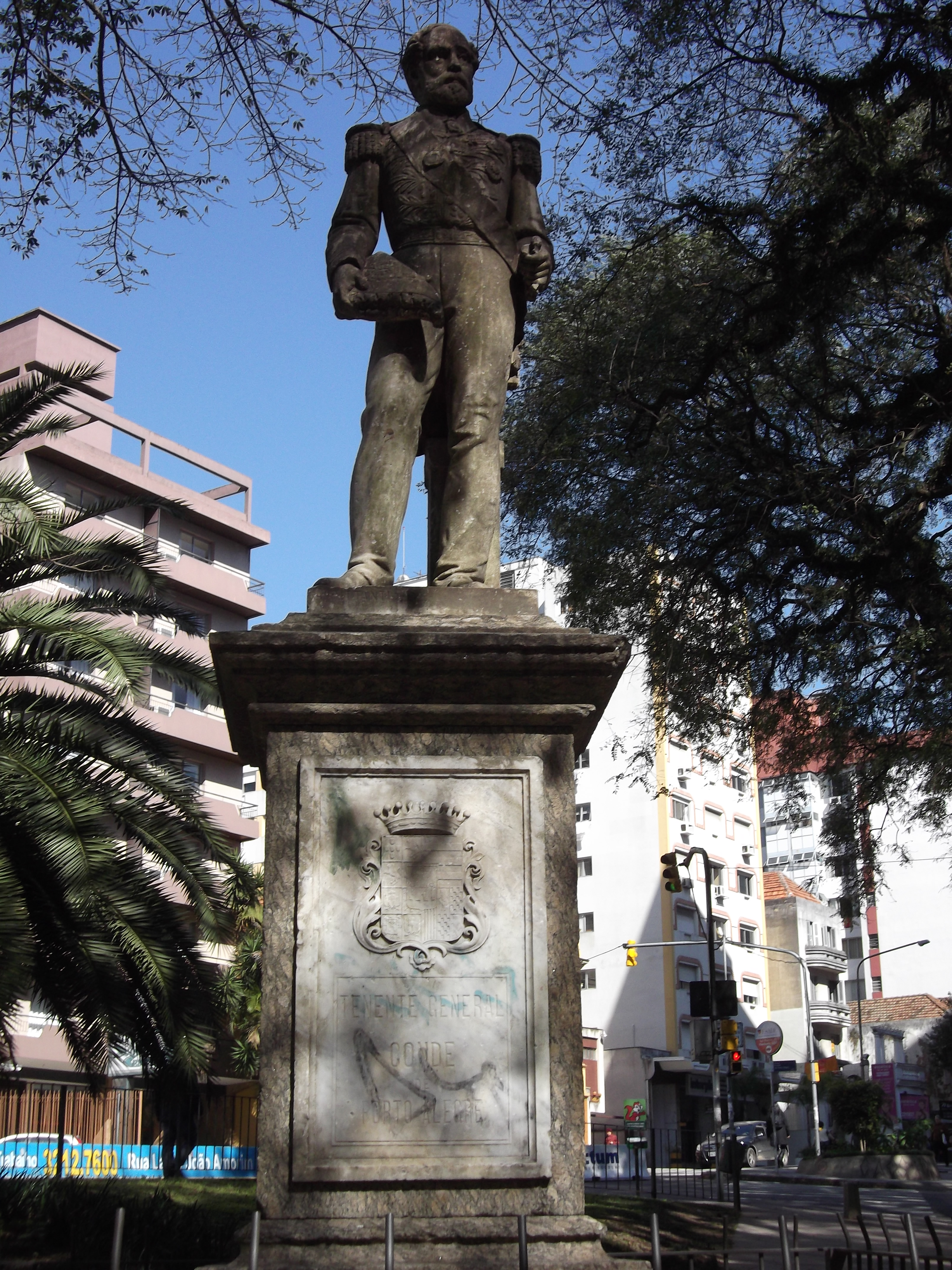 Estátua do Conde de Porto Alegre, Porto Alegre, Brasil